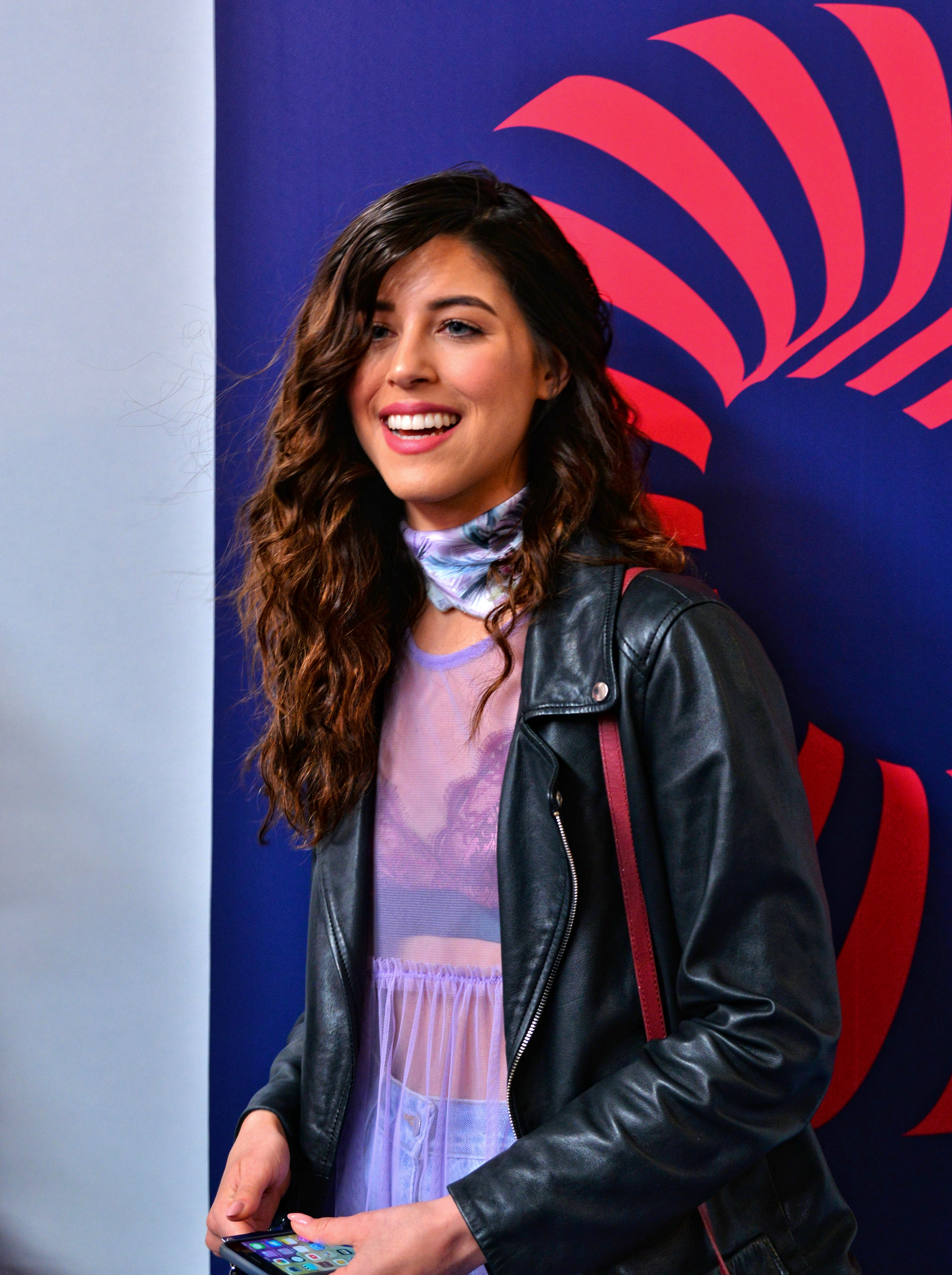 Грецька співачка Демі на співочому конкурсі Євробачення 2017 у Києві